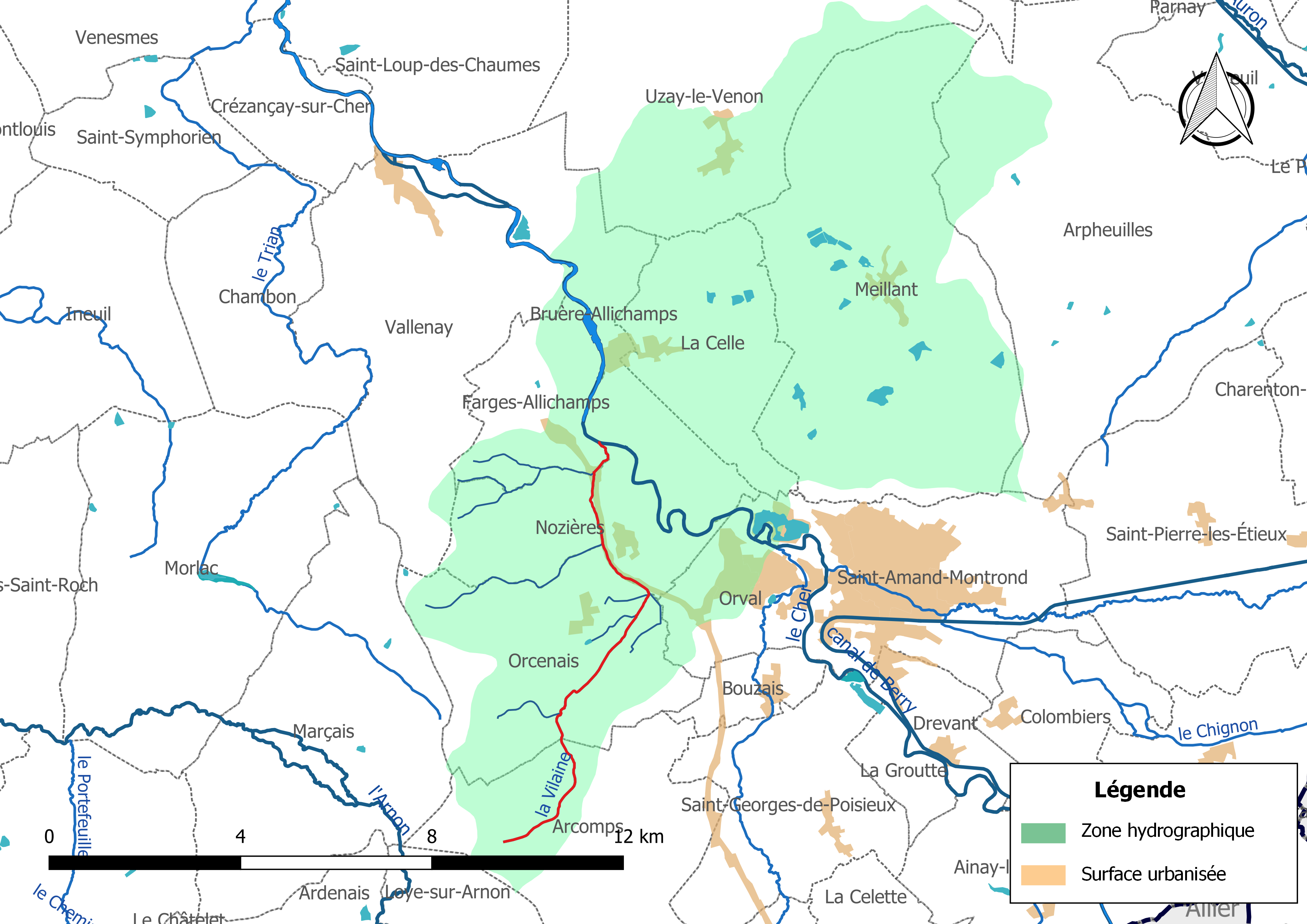 Carte du cours d'eau « la Vilaine » (France) et de la zone hydrographique dans laquelle il s'insère.